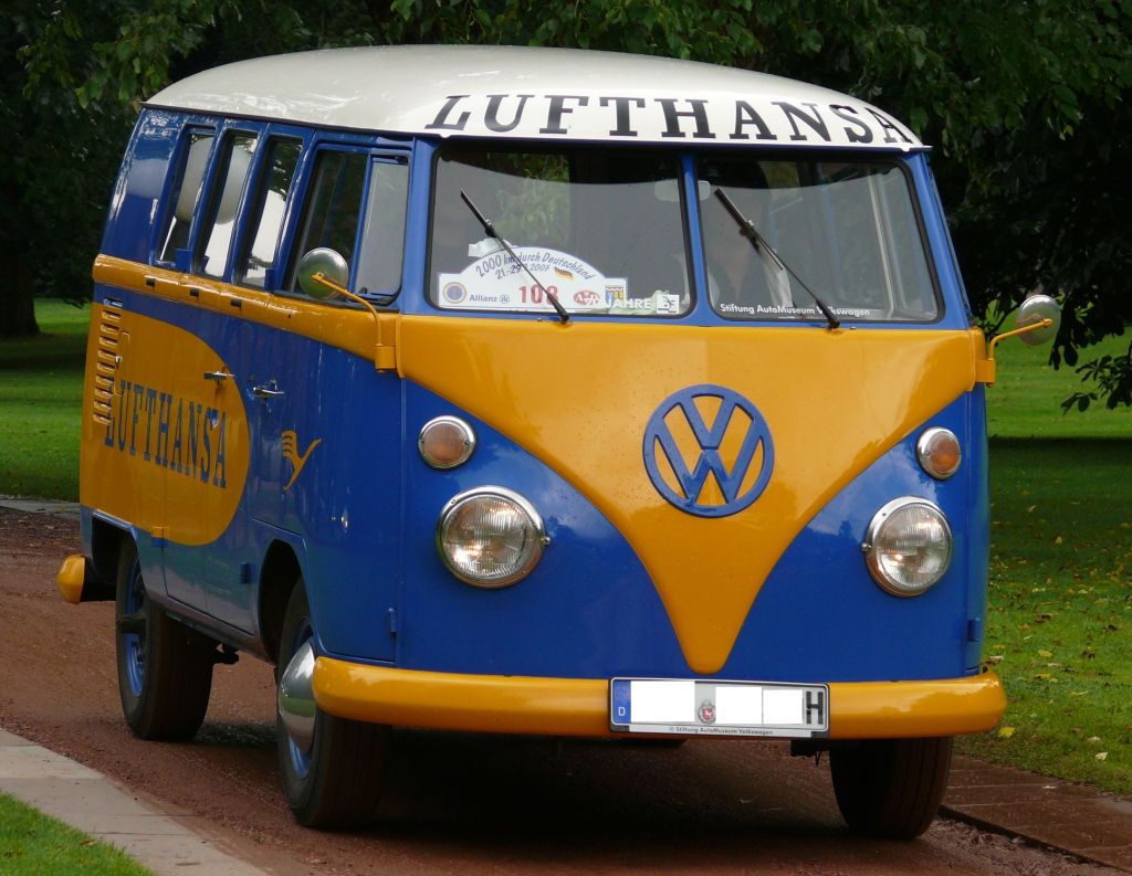 VW Bus Lufthansa